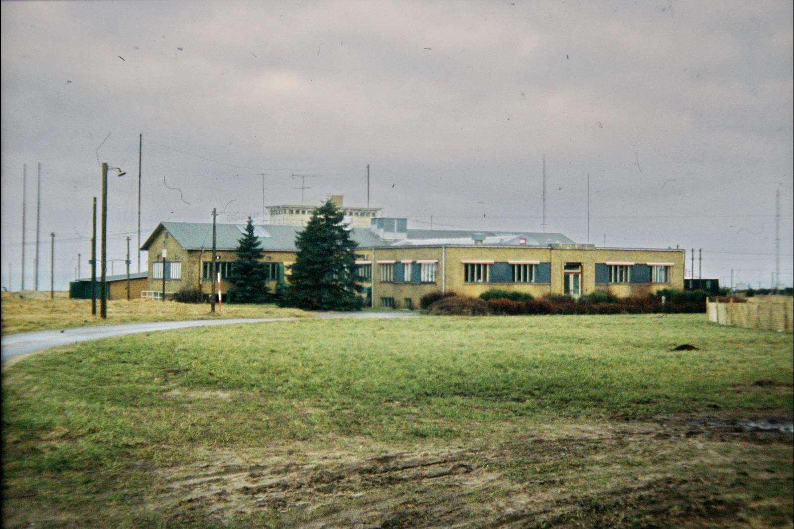 Skamlebæk Radio